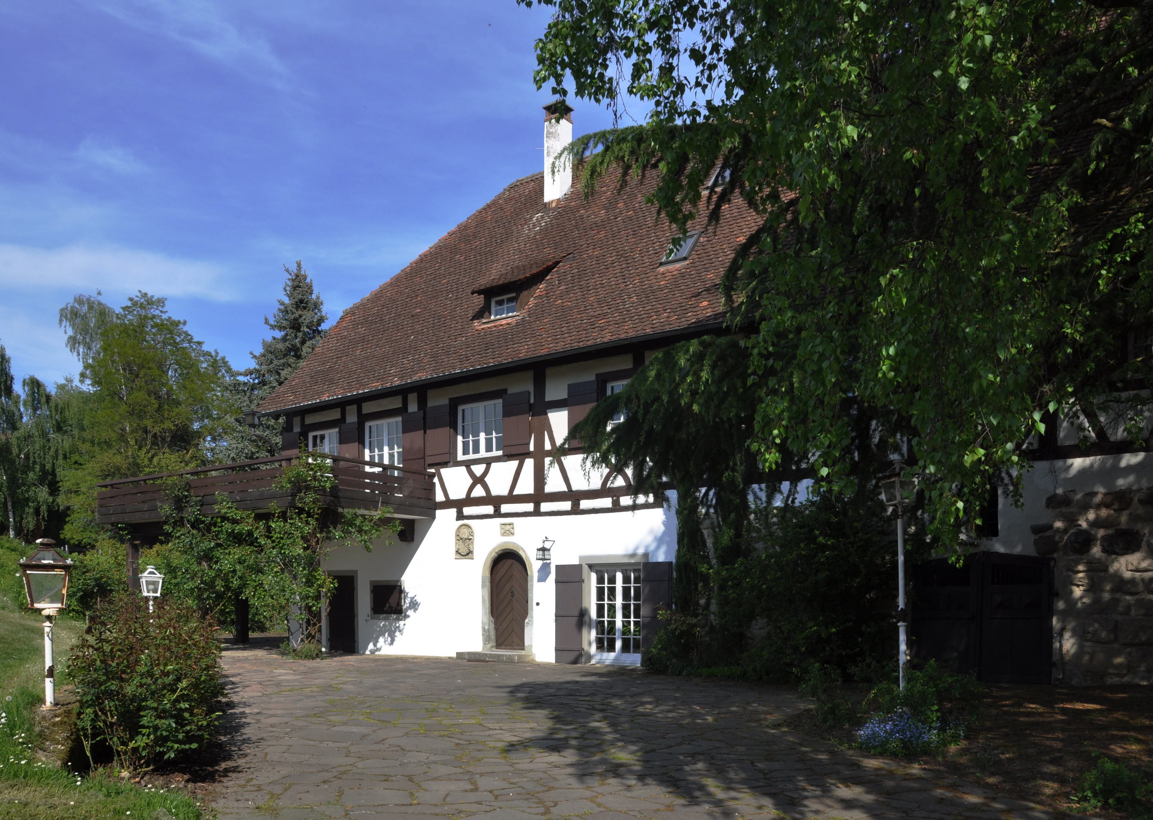 Hagnau am Bodensee, Salmannsweilerhof